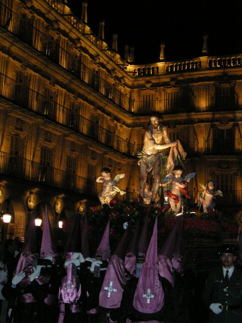 N. P. Jesús Flagelado. Talla de Luis Salvador Carmona. Salamanca